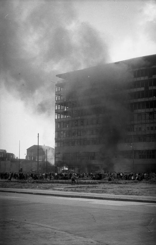 Note: This description has been identified as biased or incorrect: SED-bias. Berlin, brennendes Columbiahaus ADN-ZB/Junge/18.6.1953/ Faschistische Provokation im demokratischen Sektor von Groß-Berlin am 17.6.1953 U.B.z.: Blick auf das von Faschisten in Brand gesetzte HO-Geschäft im Columbiahaus am Potsdamer Platz. Information added by Wikimedia users.